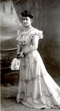 D'Marguerite Mongenast-Servais, Foto vum Ch. Bernhoeft, Kollektioun Ch. A. Wurth